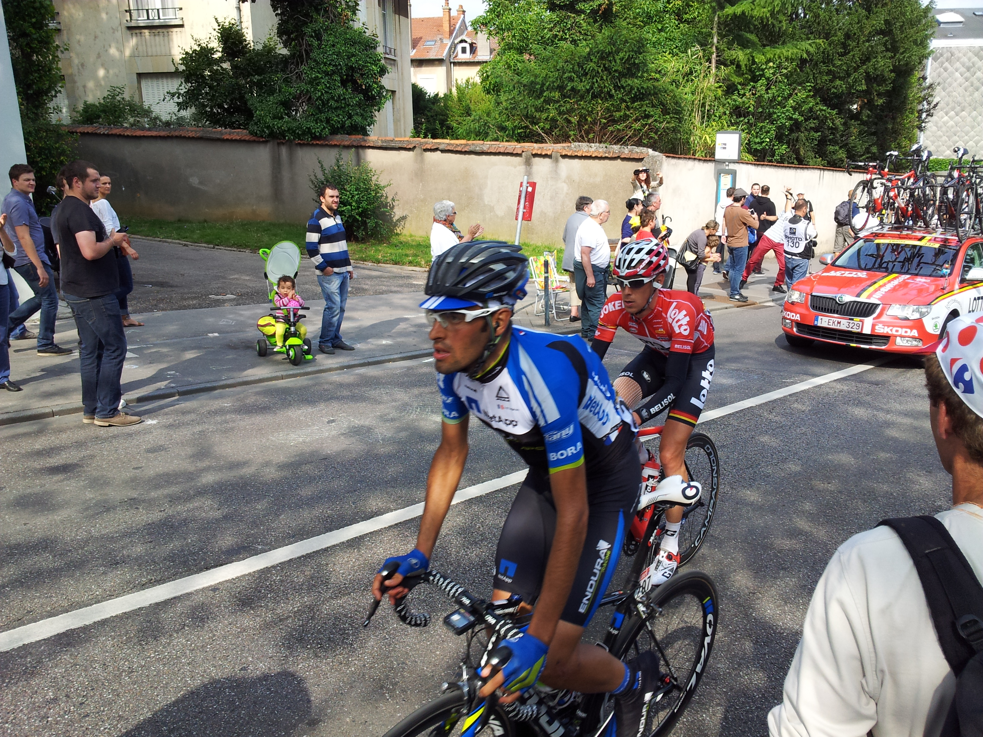 7e étape du Tour de France 2014 au début de la Côte de Boufflers.